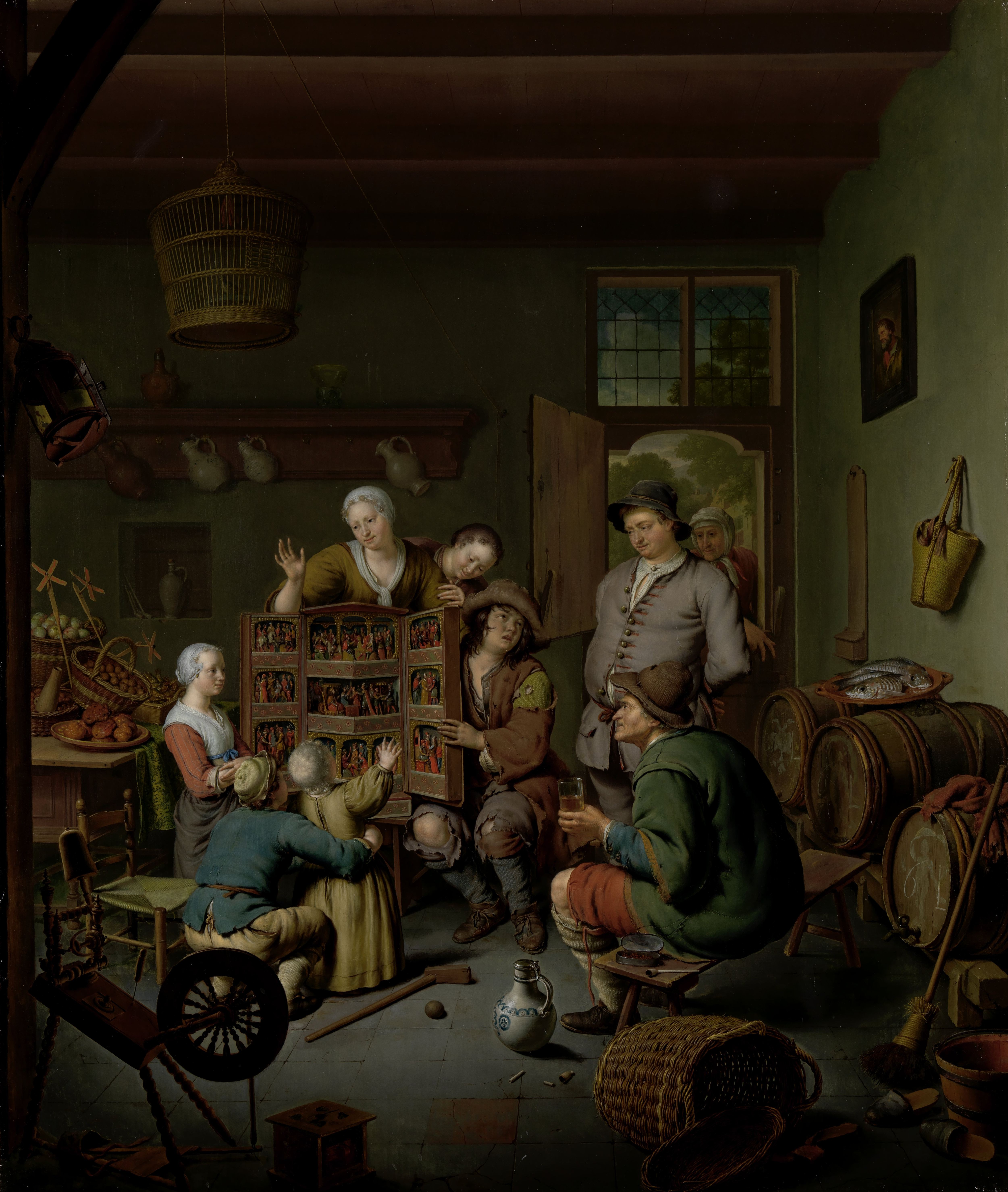 De rarekiek (door de kunstenaar ' 't Fraay Curieus' genoemd). In een interieur toont een rondtrekkende Savooiaard een kijkkast ten overstaan van een familie met kinderen. In de rarekiek zijn scènes voorgesteld, wellicht uit een ridder- of andere populaire roman. De kamer staat vol huisraad: een spinnewiel, manden met fruit, speelgoedmolentjes, een mand, sloffen en een emmer met een bezem. Tegen de rechterwand staat een rij vaten waarop iemand een bord met vis heeft neergezet. Aan de rechtermuur een schilderij, tegen de achterwand een rek met kruiken. Aan het plafond hangt een vogelkooi.